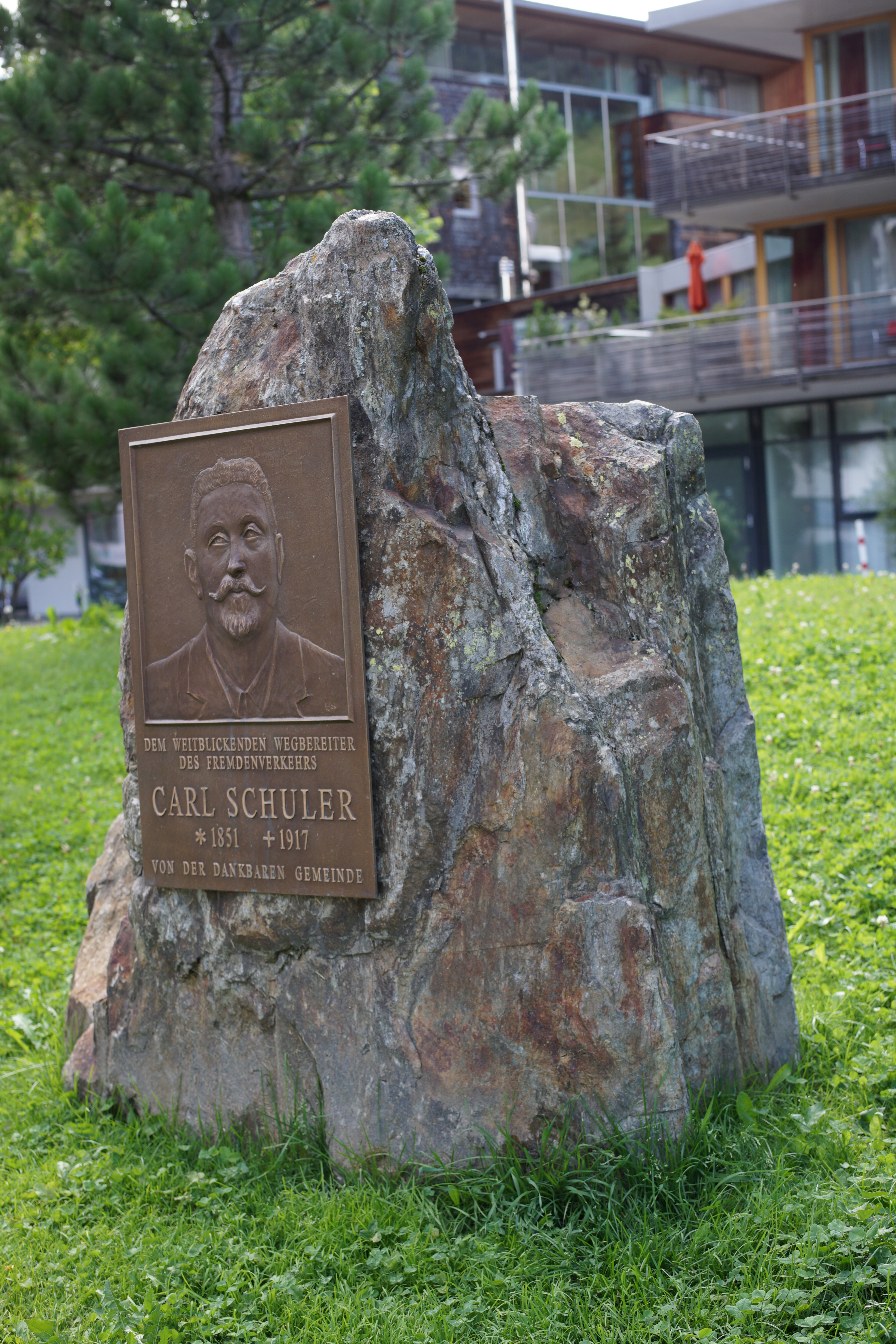 Das Denkmal befindet sich im Park nördlich des alten Bahnhofes.